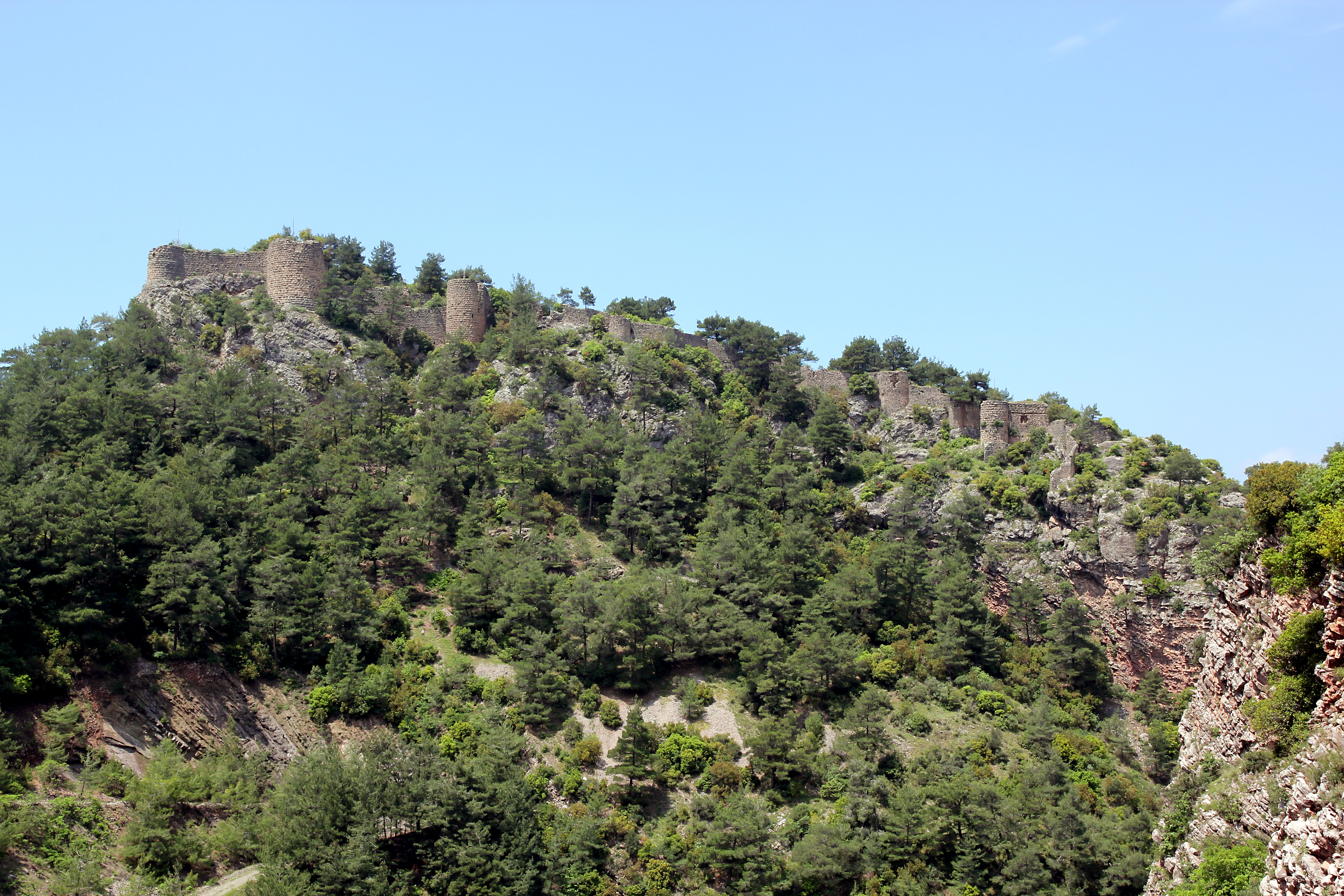 Savranda Kalesi, Sarventikar, Festung nahe Osmaniye, Türkei